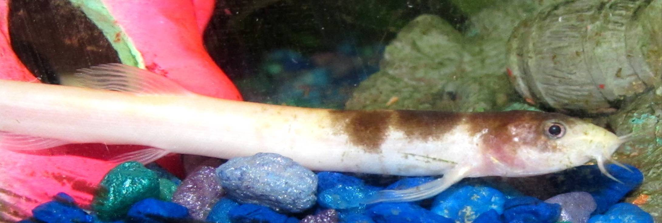 Date:4-26-2011 Misgurnus anguillicaudatus in aquarium.